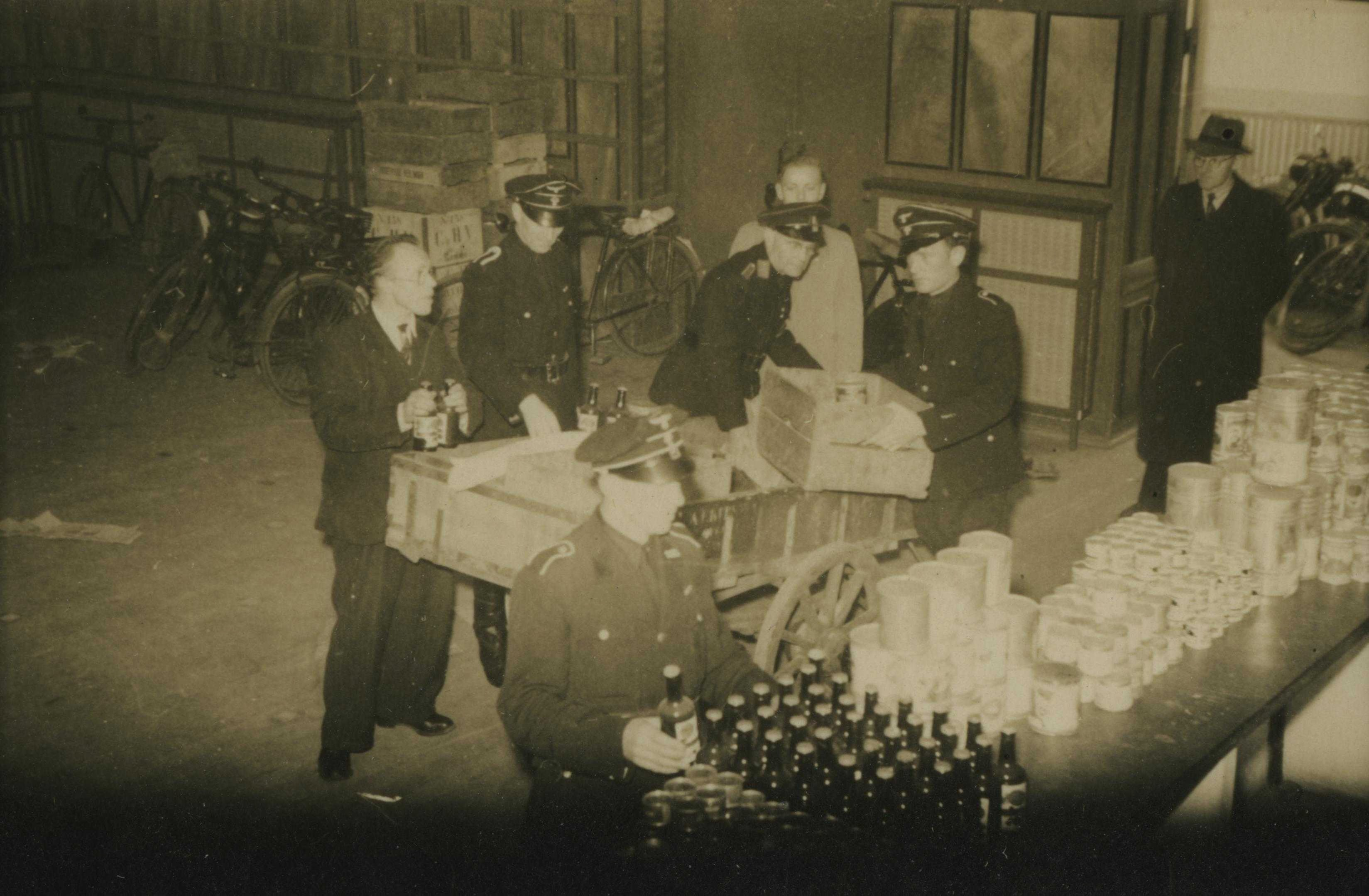 'In beslag genomen blikgroenten door de Landwacht'. Door voedselschaarste was er veel zwarte handel. In Amsterdam, en elders, werden door de Landwacht ( ongeoorloofde) controles uitgevoerd bij handelaren en telers en voedsel in beslag genomen waarvan werd vermoed dat het voor de zwarte markt bestemd was. In juni 1944 werd in diverse kranten hier aandacht aan besteed. Deze foto is afkomstig uit het archief van de Fotodienst der NSB.